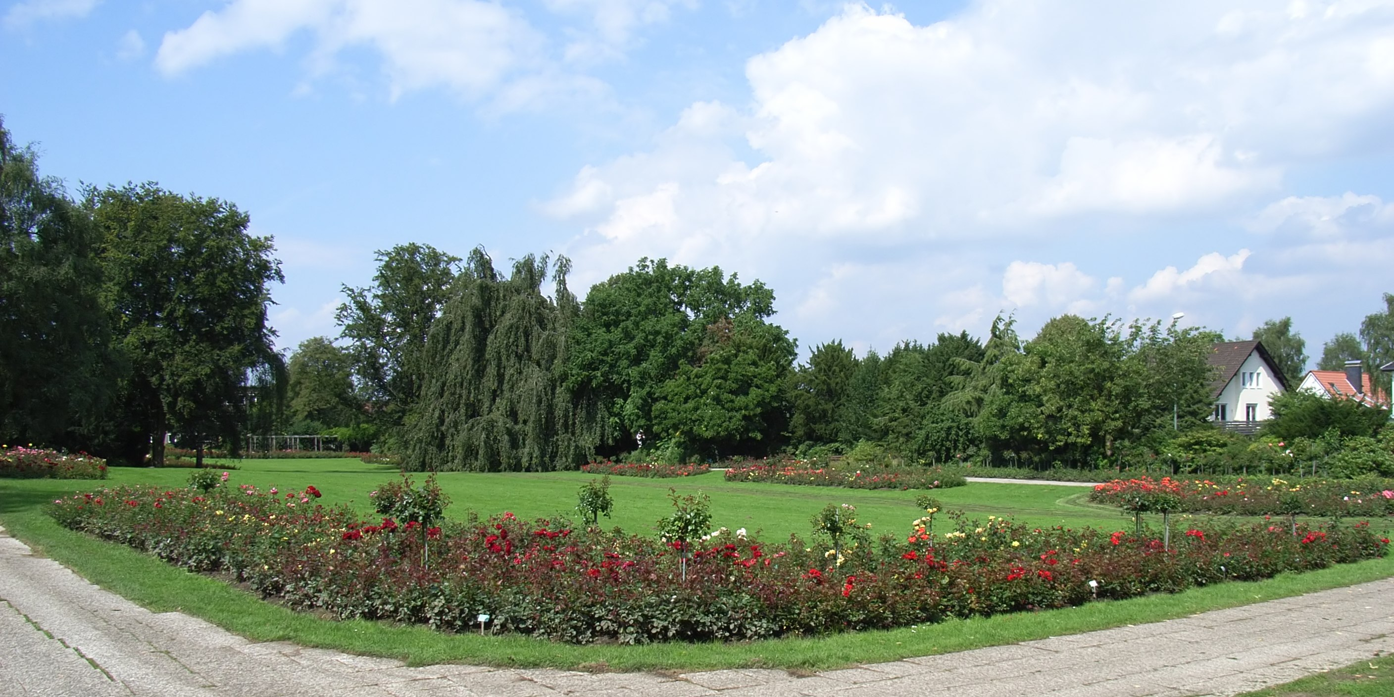 Bielefeld, Deutschland: Rosengarten neben der Rudolf-Oetker-Halle.